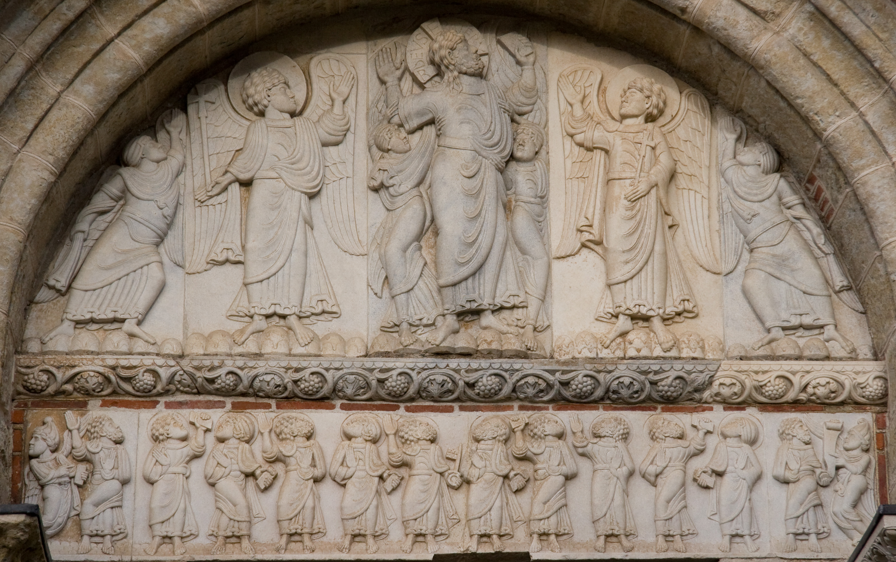 Tympan de la porte Miégeville (Ascension du Christ)